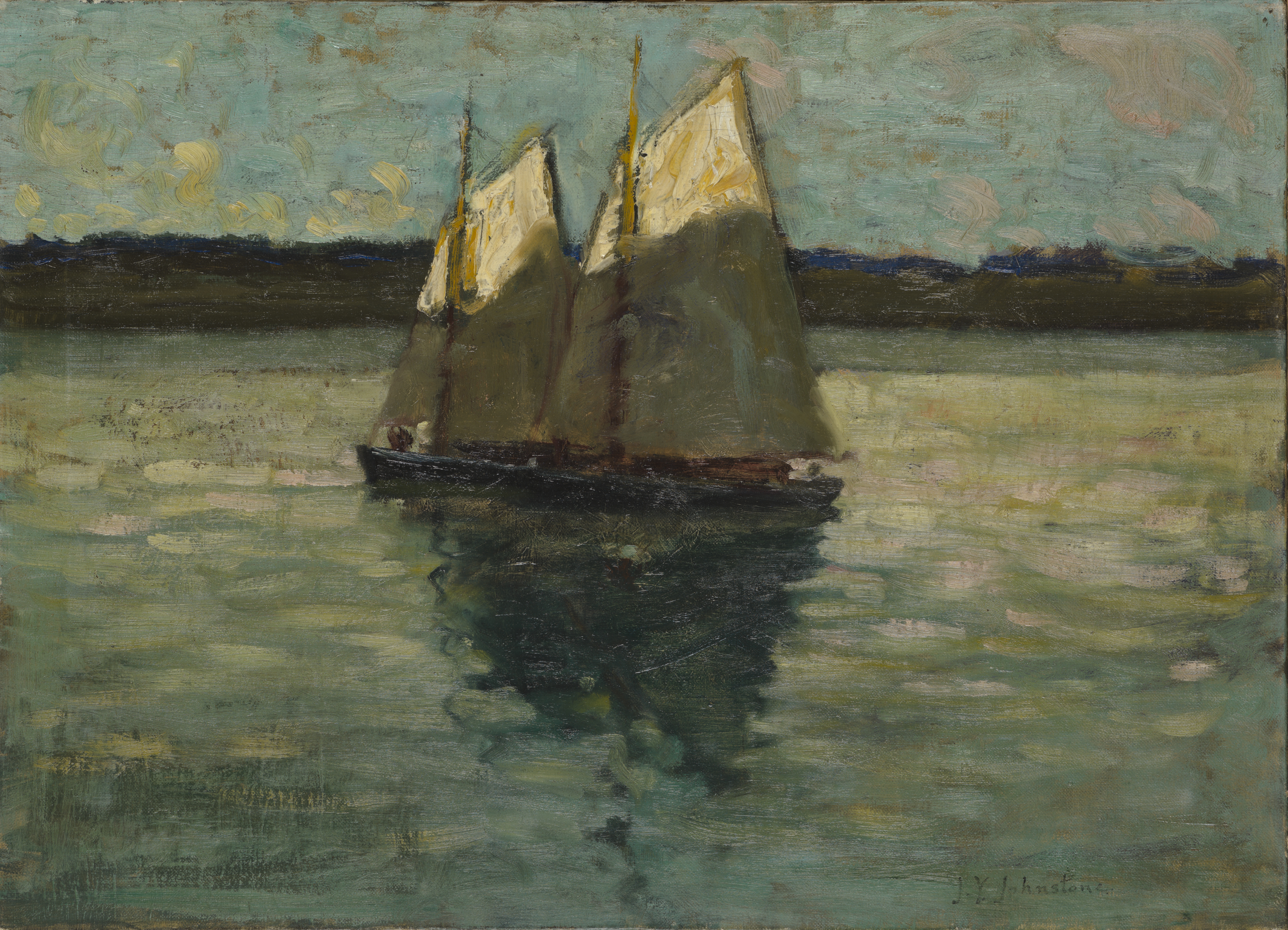 John Young Johnstone: Le Soleil sur les voiles date de production entre 1910 et 1928. Huile sur toile, 403 cm × 56 cm (159 in × 22 in) Collection MNBAQ (1947.144)